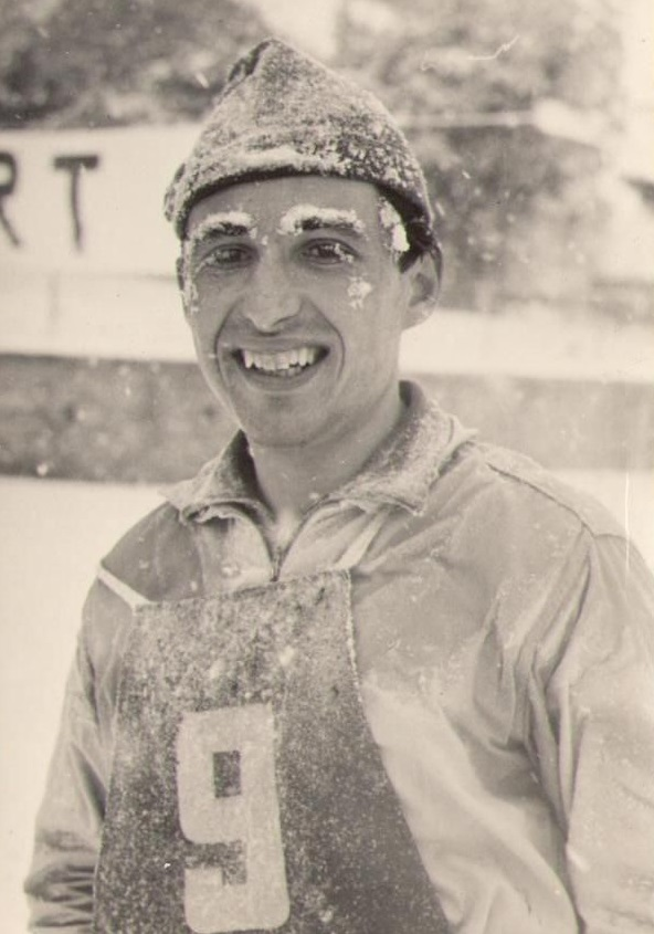 Josef Jindra, lyžařské závody 30 km, Kunvald 1958